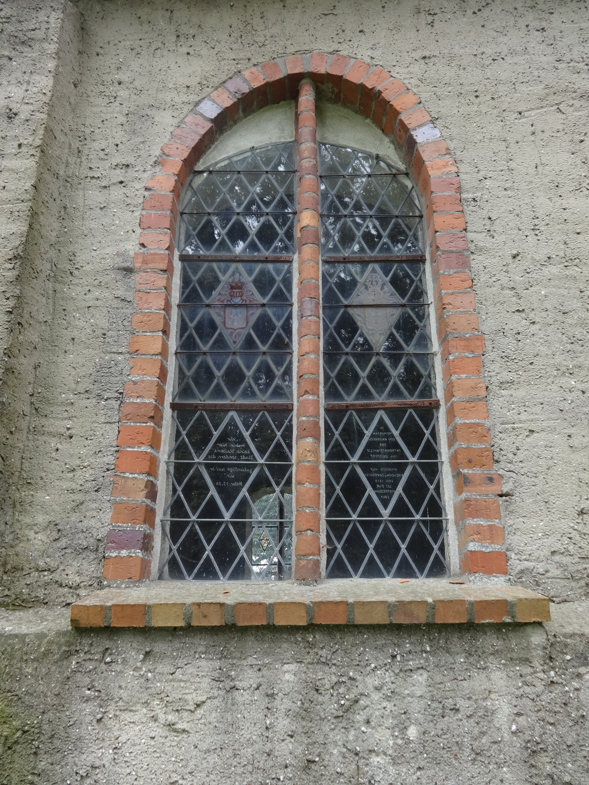 Dorfkirche in Rubkow aus der zweiten Hälfte des 14. Jahrhunderts mit Reliefs der Evangelisten aus dem 17. Jahrhundert und Kabinettscheiben der Familien Below und Quistorp; auf dem Friedhof ein Mausoleum aus dem Jahr 1877 für August von Quistorp und seine Frau Emilie.